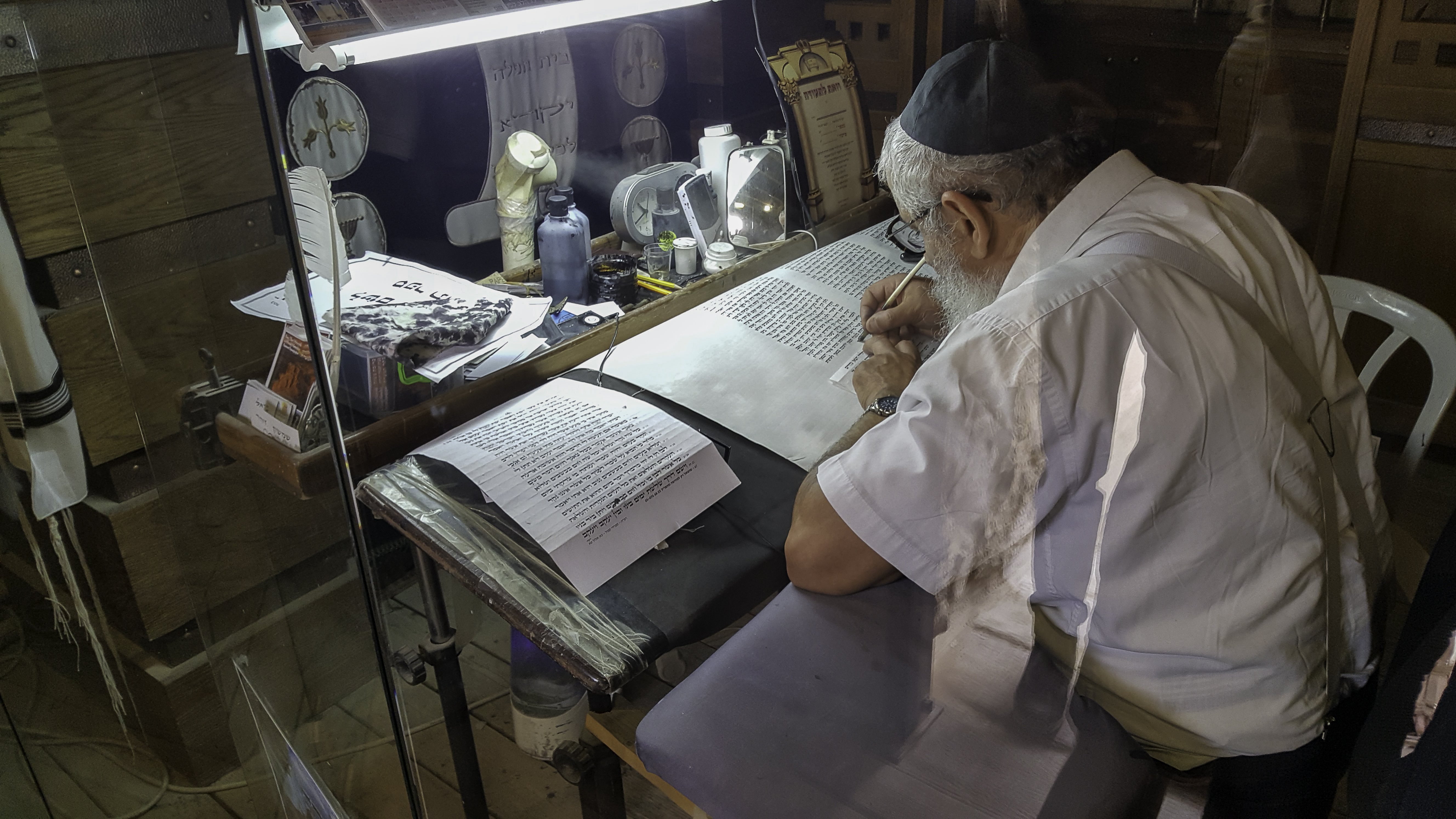 Rabbi writing Genesis in Hebrew in a preserved room of the demolished synagogue of Masada